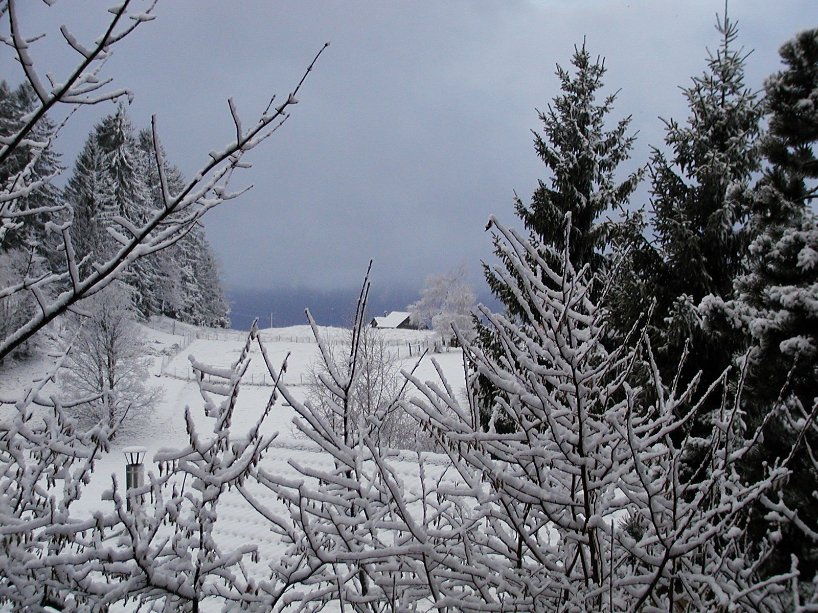 Schneelandschaft in Furx, Vorarlberg, Österreich